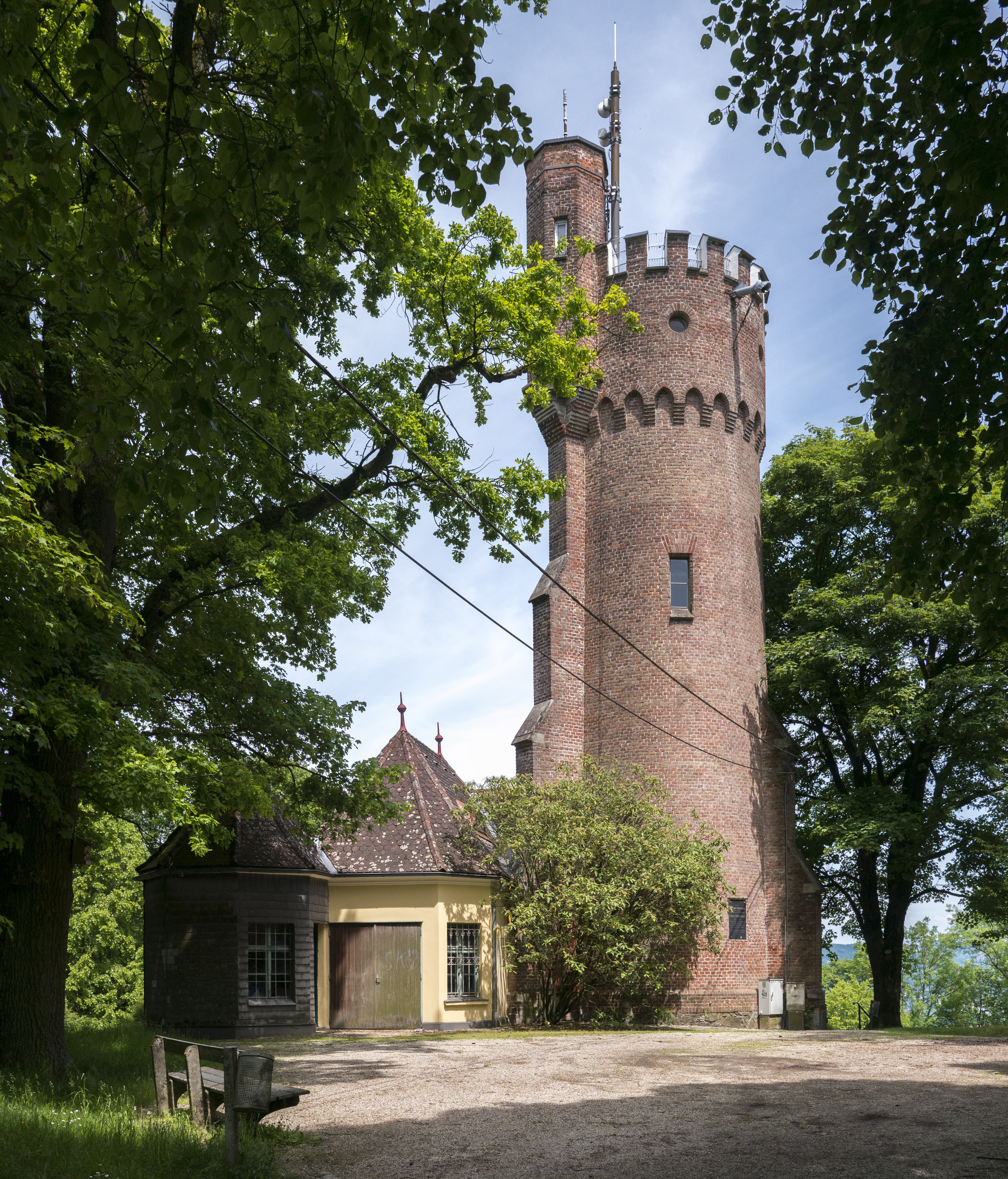 Freinbergwarte, Kaiser-Franz-Josef-Jubiläumswarte